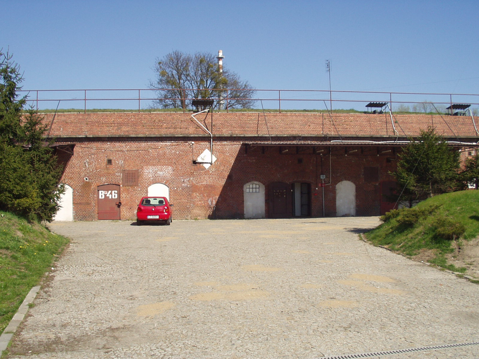 Koszary nasady Fortu III Twierdzy Toruń